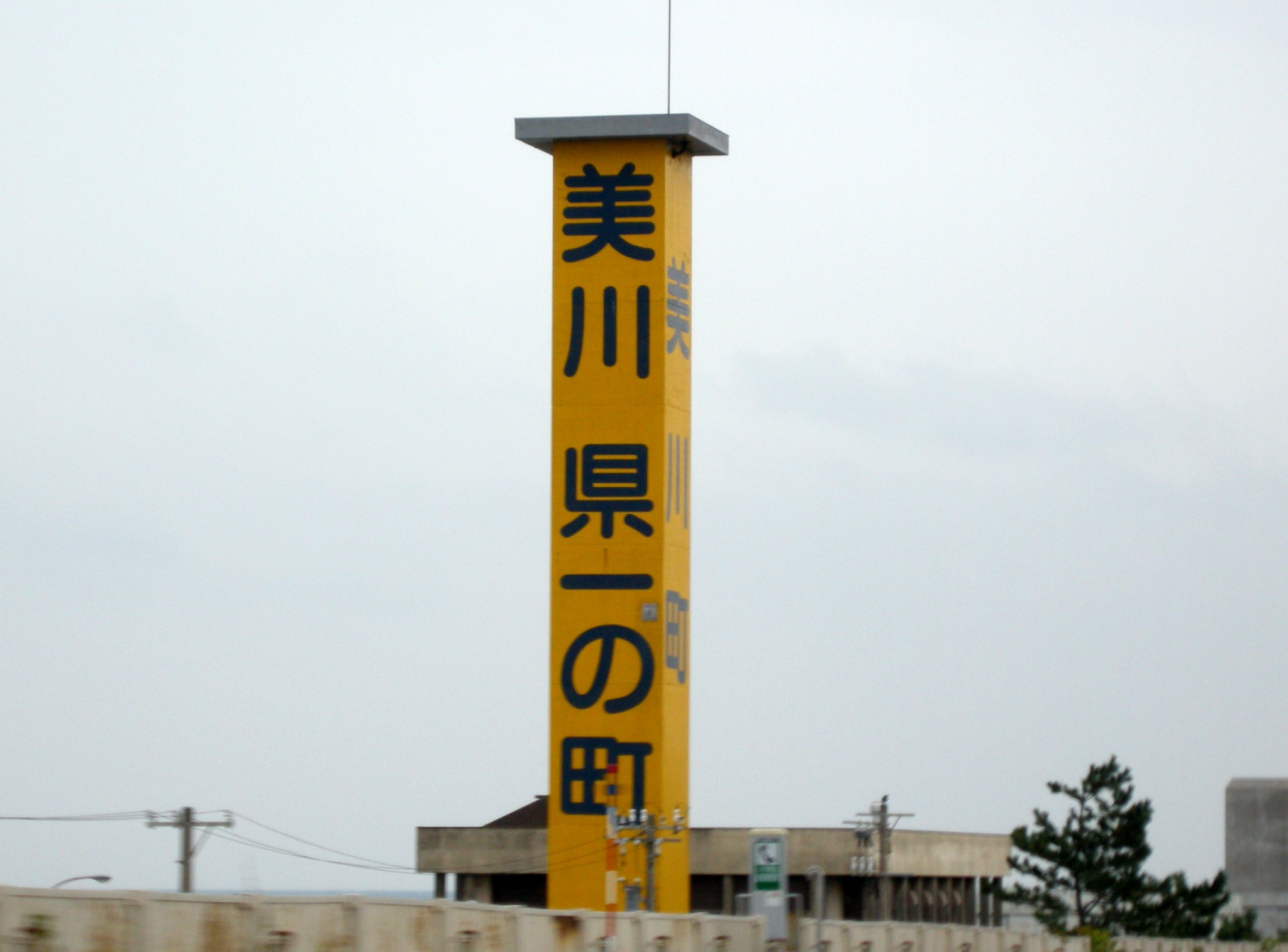 美川 県一の町 (石川県白山市美川永代町)